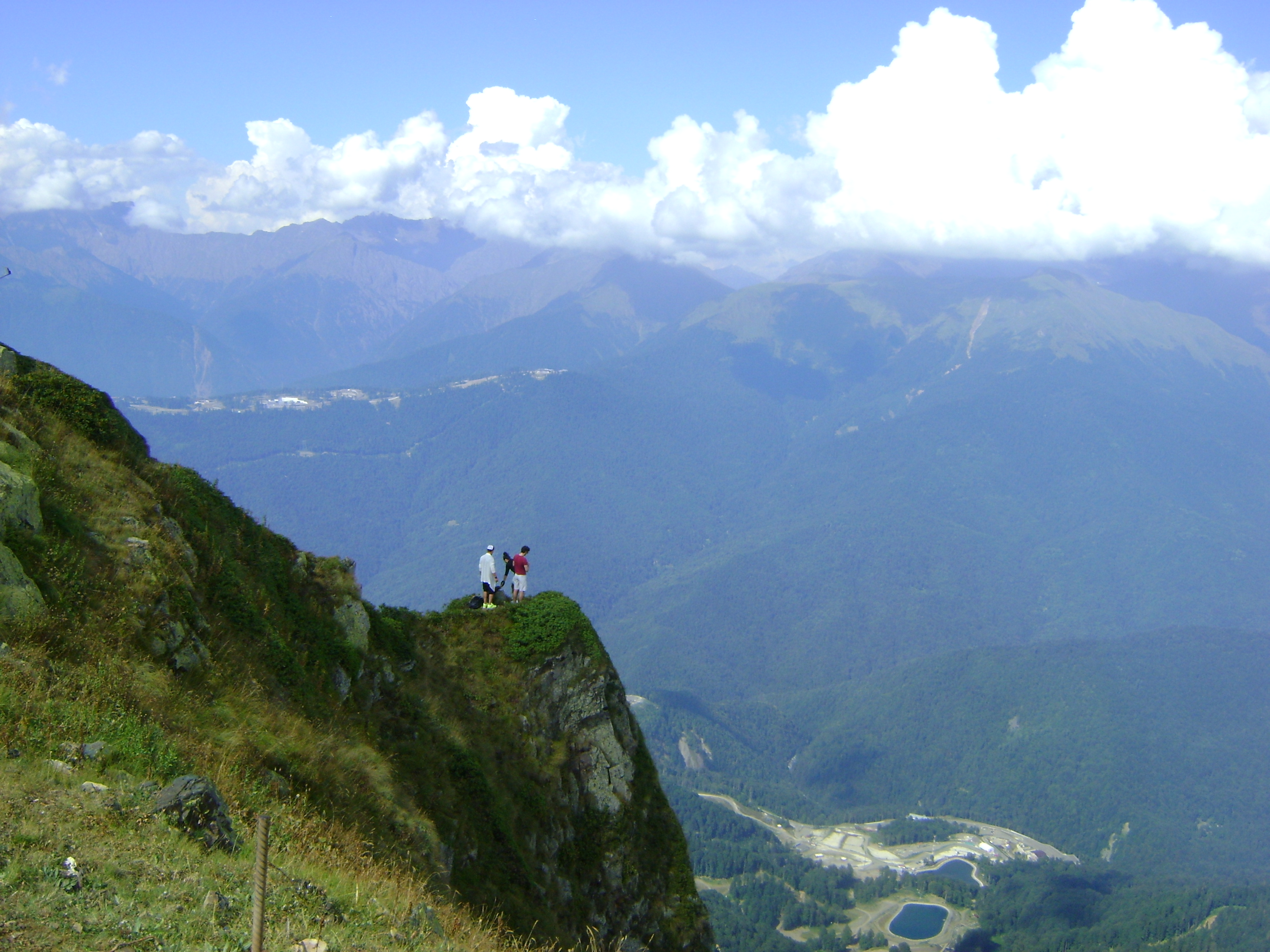 Сочі.